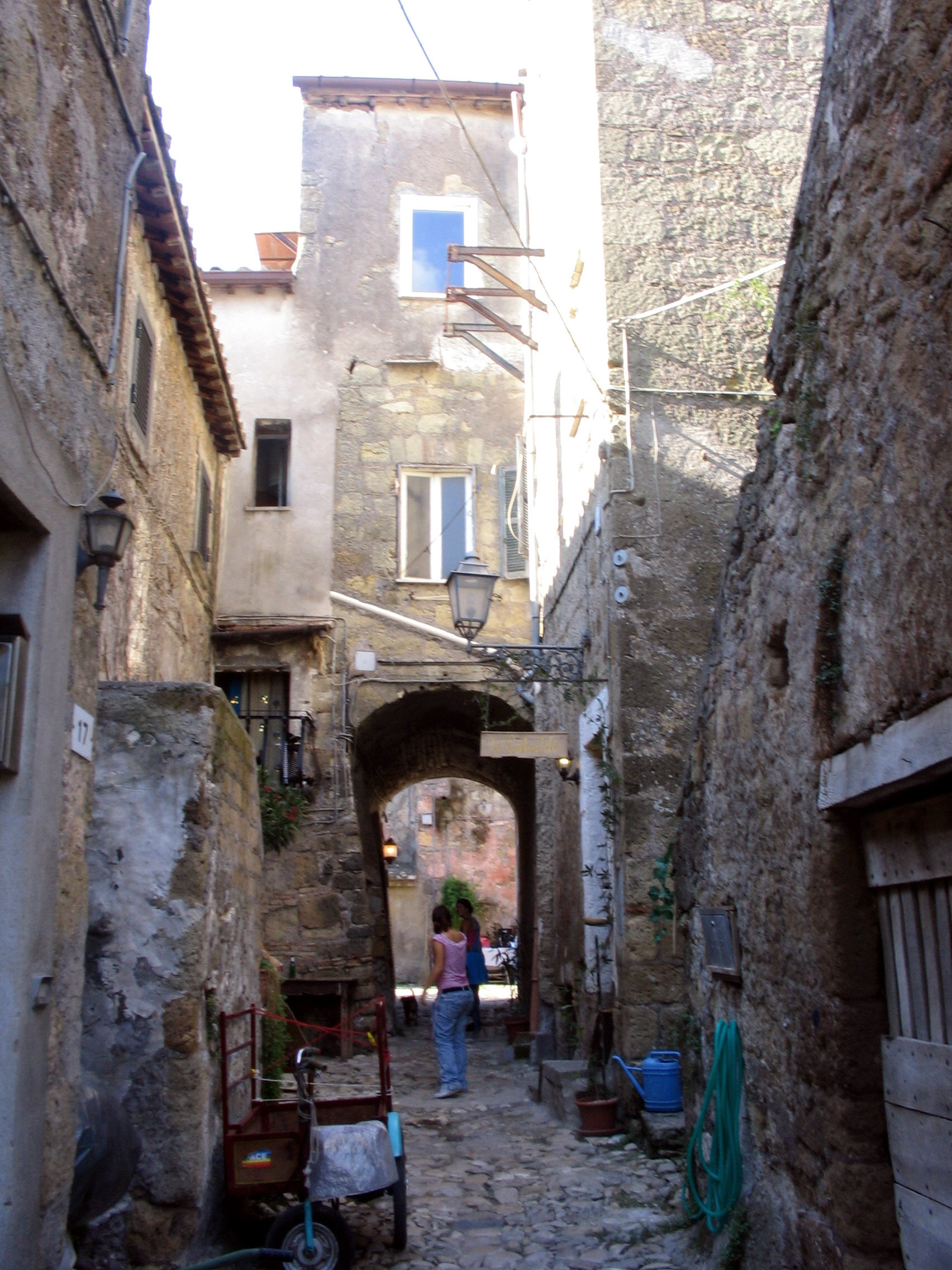 Calcata, Lazio, Italia